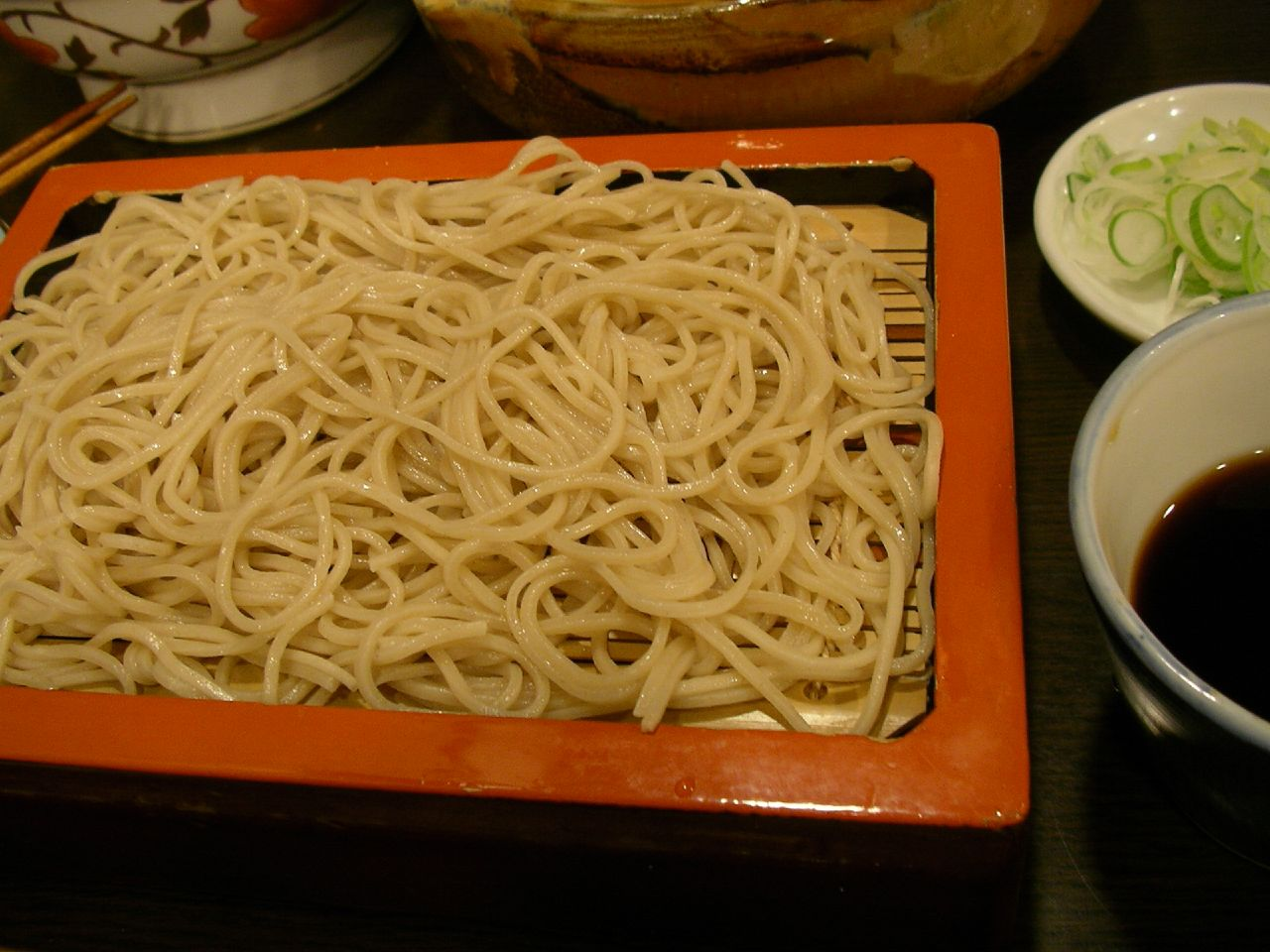 morisoba @ murayama むら山 (中央区湊)